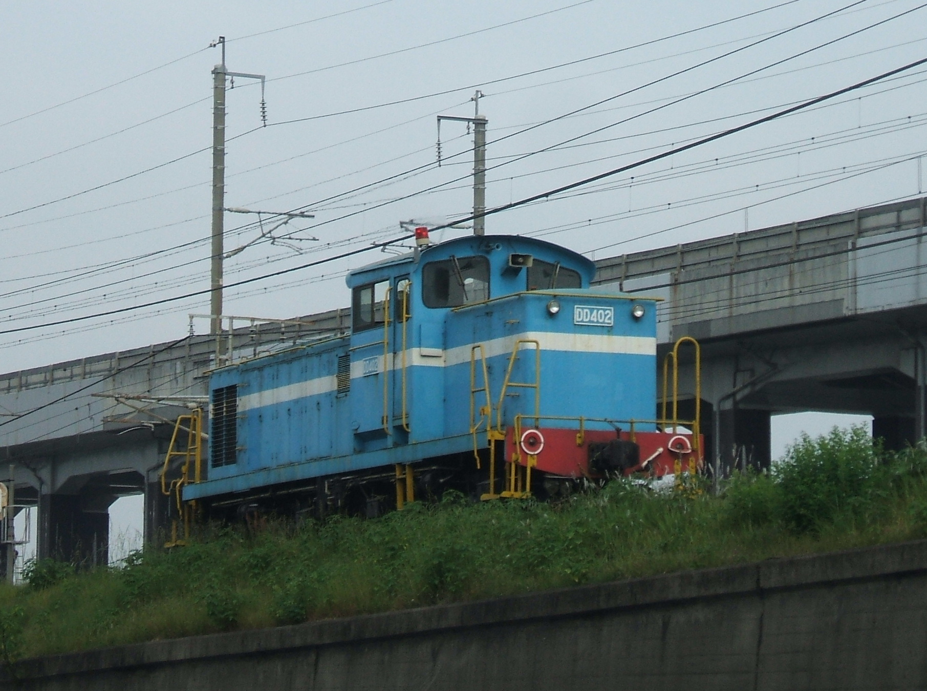 広島県福山市のJFEスチール西日本製鉄所福山地区引き込み線を走行するDD402機関車（製鉄会社所属）、背景の高架橋は山陽新幹線である。(JFE STEEL RAILWAY in Fukuyama Hiroshima Japan)